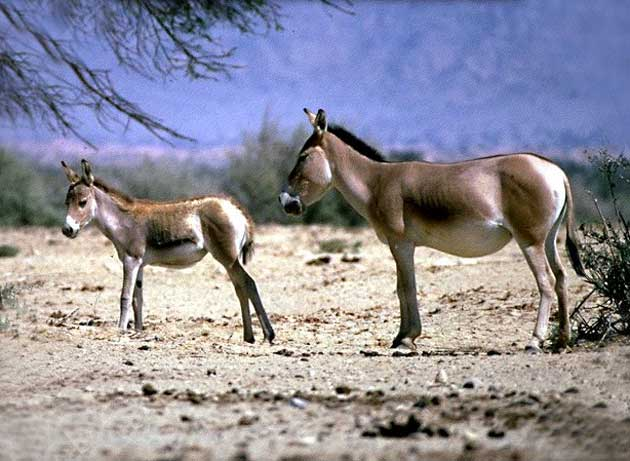 (En): In mongolia (Gobi desert)(Equus hemionus) (Fr): En mongolie (Désert de Gobi)Hémione (Equus hemionus)